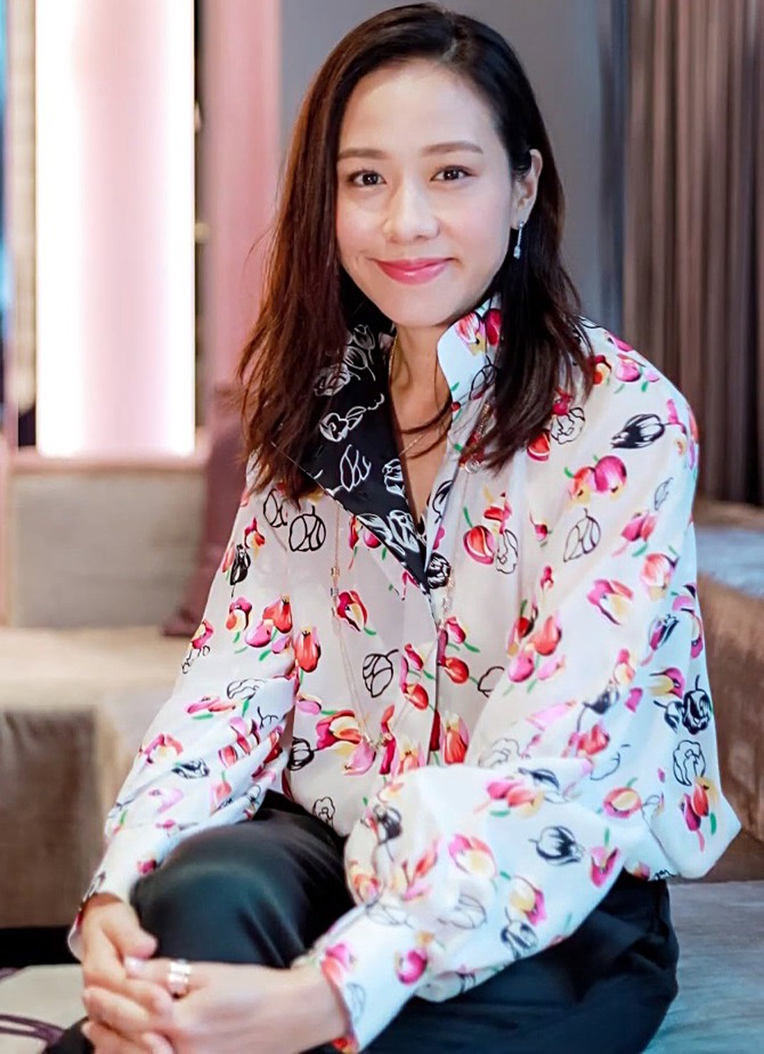 中文（香港）: 《am730》專訪